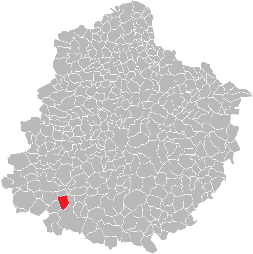 Localisation de Villaines-sous-Malicorne, en Sarthe.